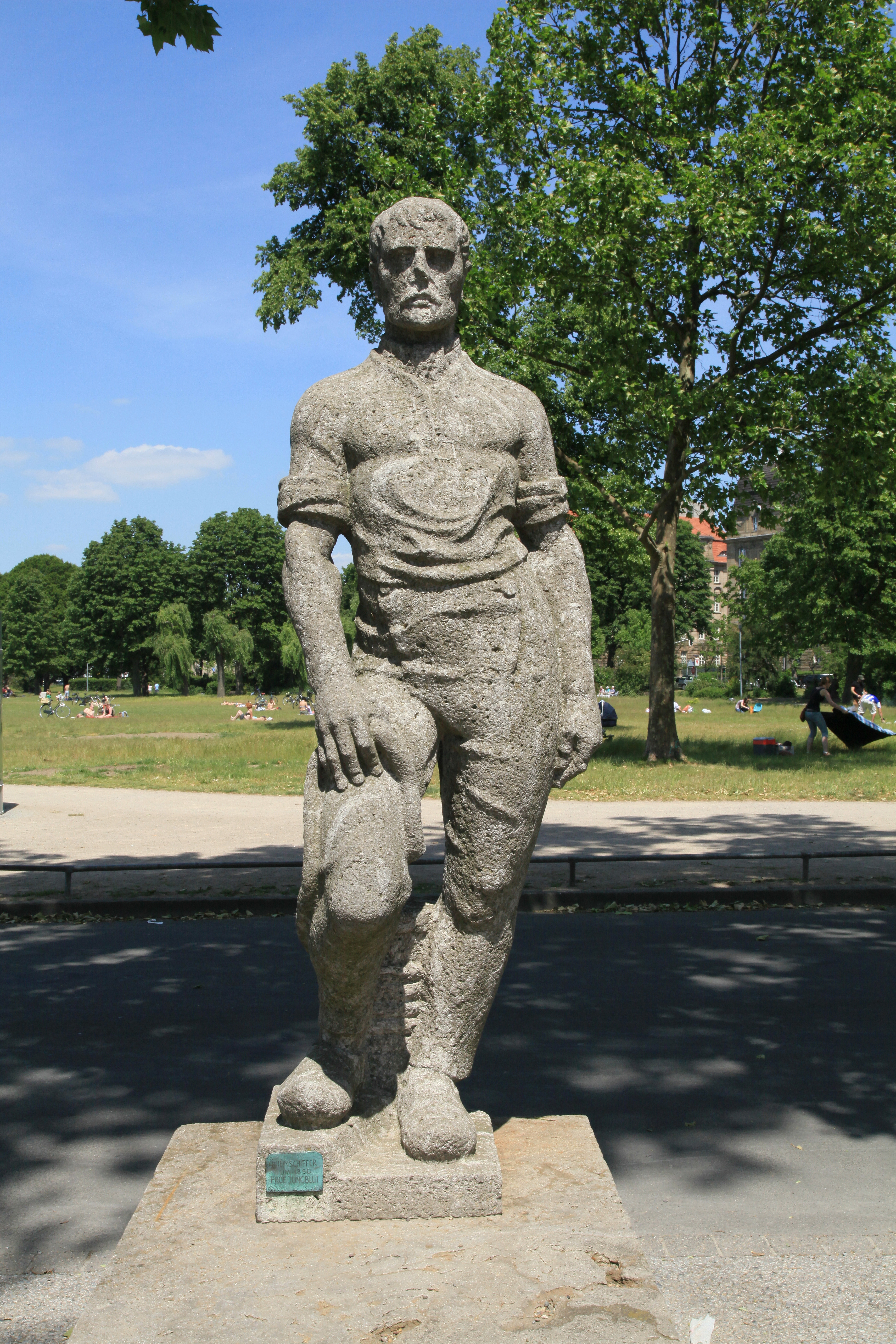 "Rheinschiffer" von Emil Jungbluth, Robert-Lehr-Ufer in Düsseldorf